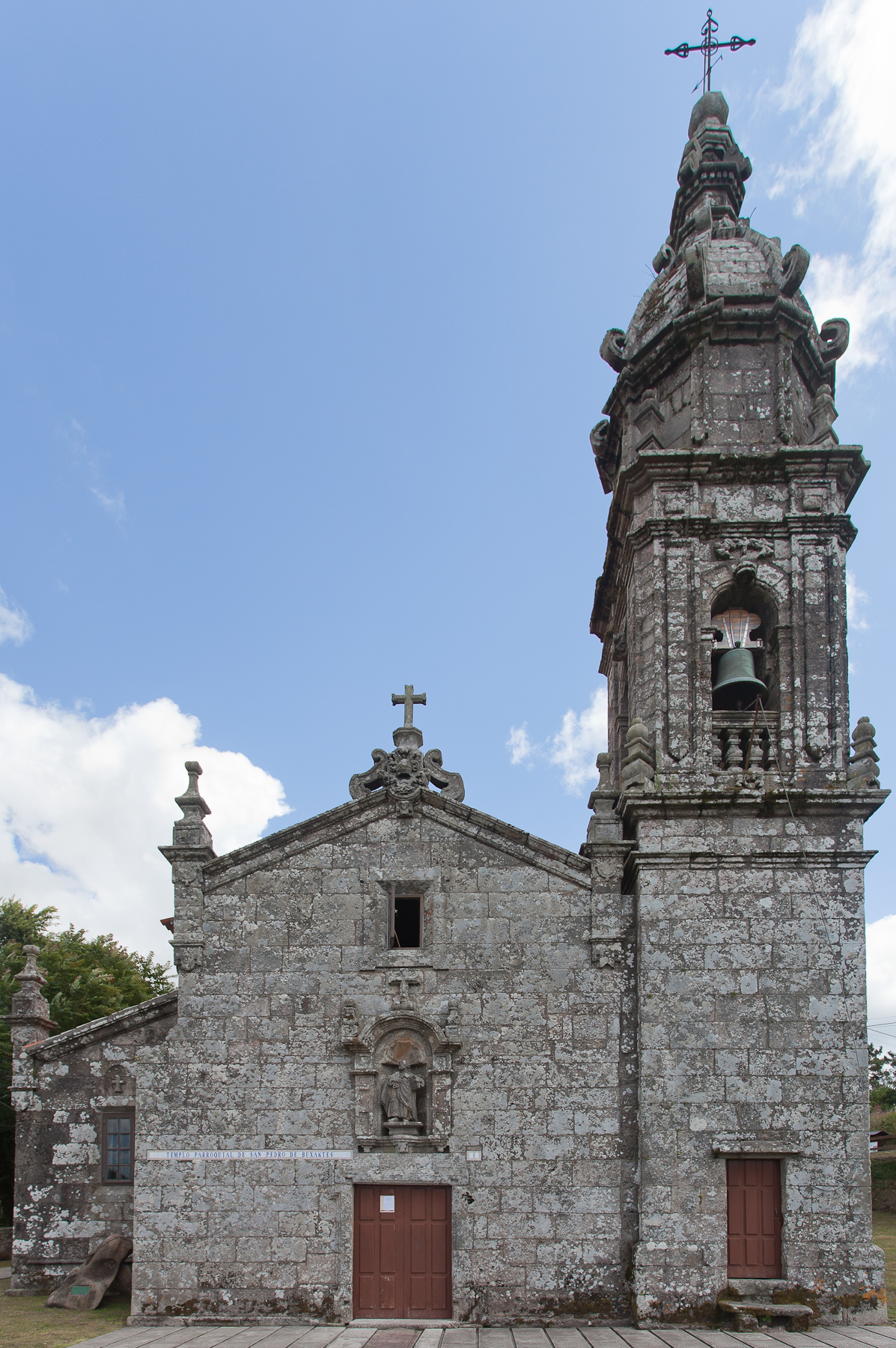 Igrexa de San Pedro de Buxantes, Dumbría, Galiza